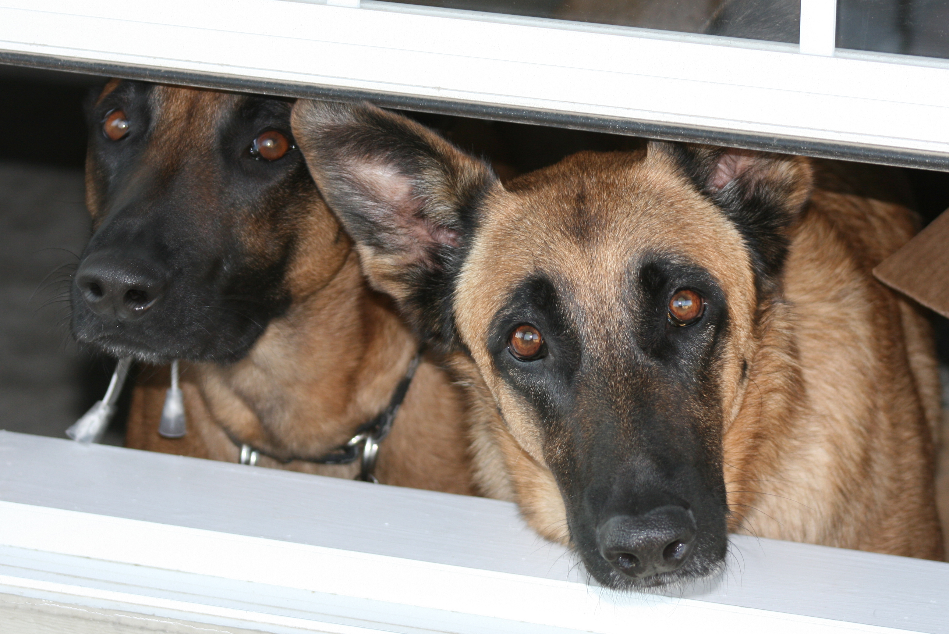 Belgian Shepherd Malinois